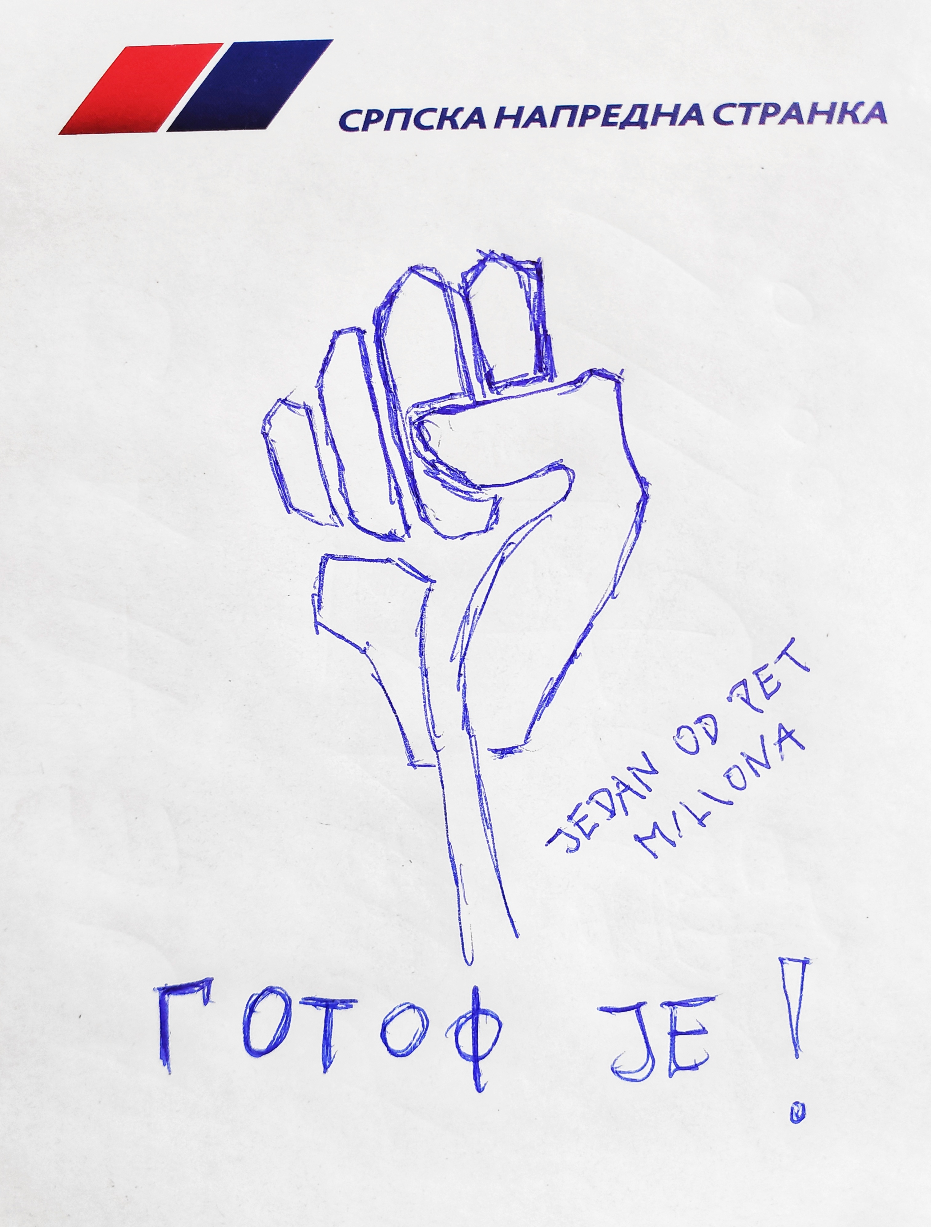 Jedan od pet miliona